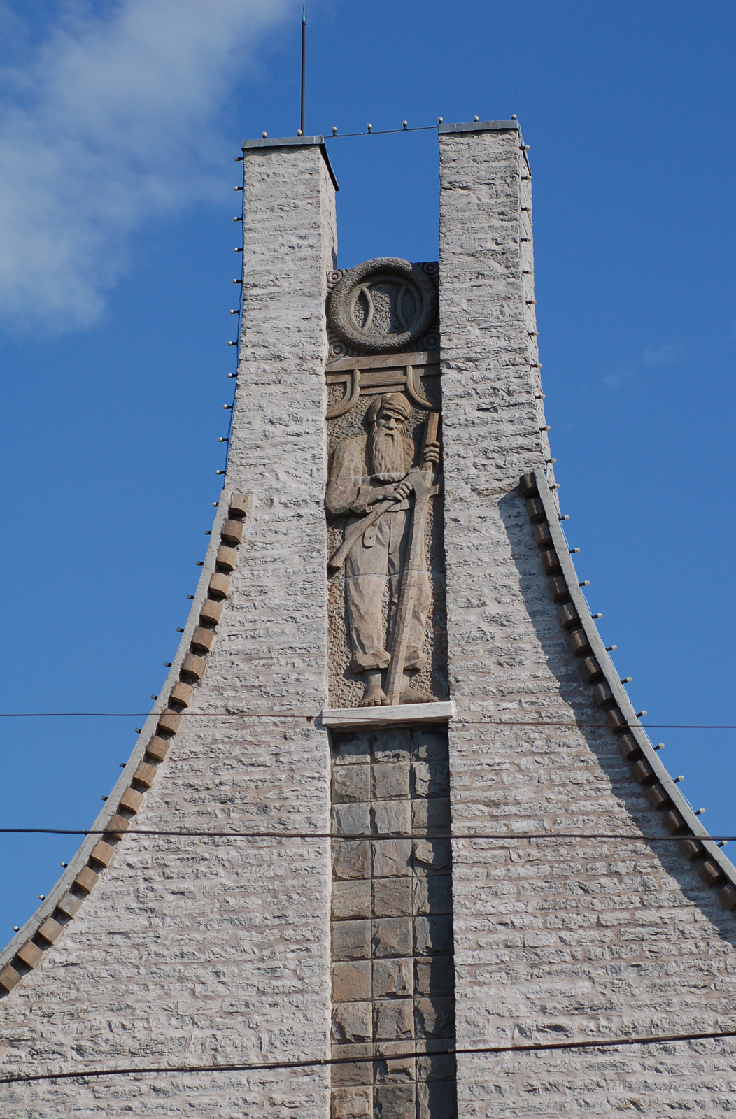 Lutheri vabriku rahvamaja fassaadi detail